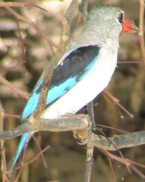 Mangrovenliest Halcyon senegaloides, Saadani-Nationalpark, Tansania, 2005